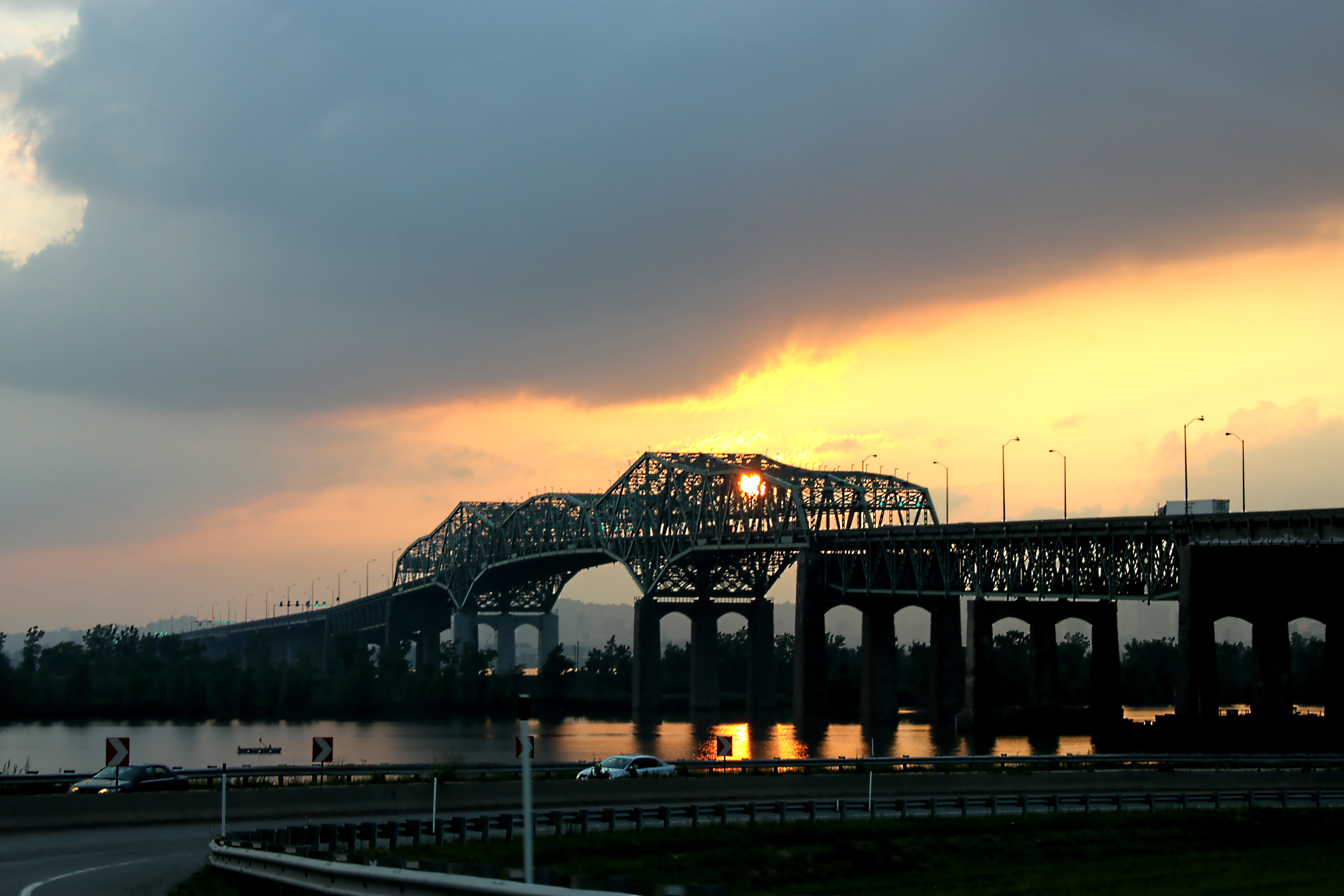 Die Champlain Brücke in Montréal gesehen von der Autobahnauffahrt auf die Autoroute 15 in der Nähe der Brücke. Aufgenommen am 30. Juli 2011.